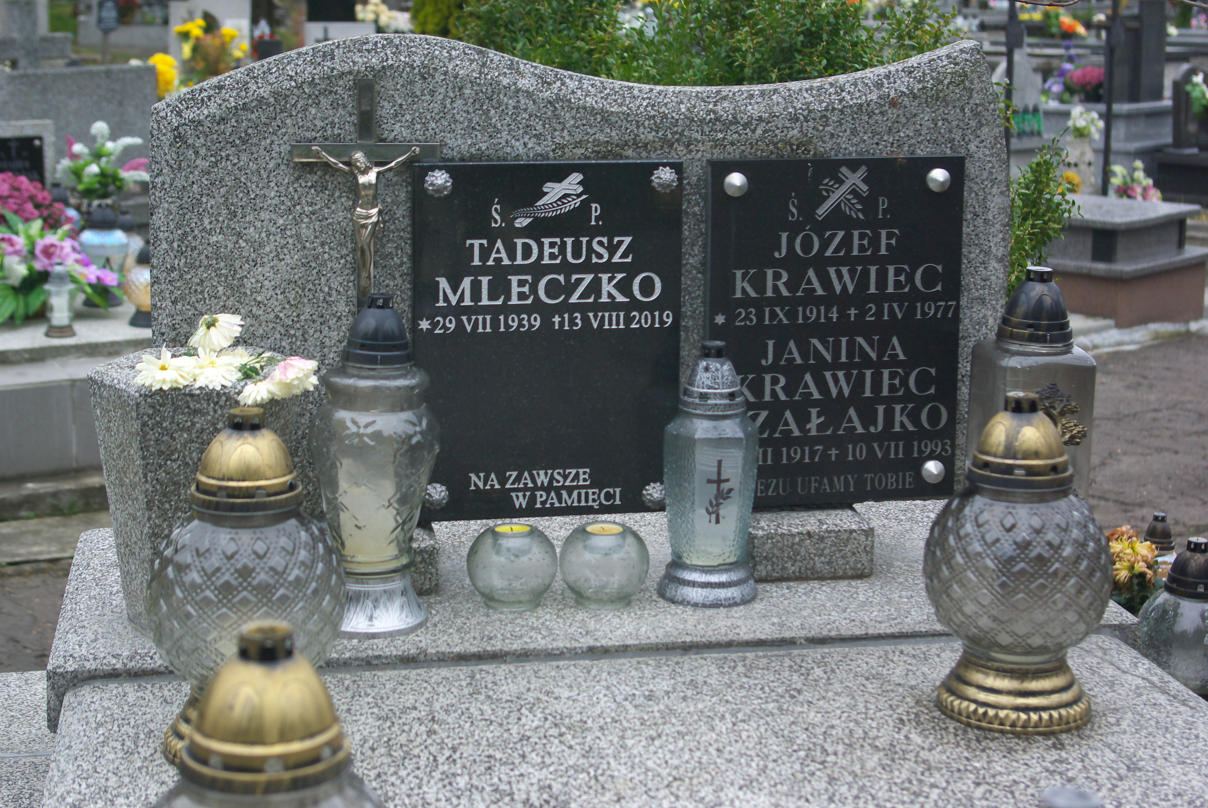 Grobowiec rodzin Krawiec, Szałajko i Mleczko na Cmentarzu Centralnym w Sanoku. Pochowany Tadeusz Ludwik Mleczko.